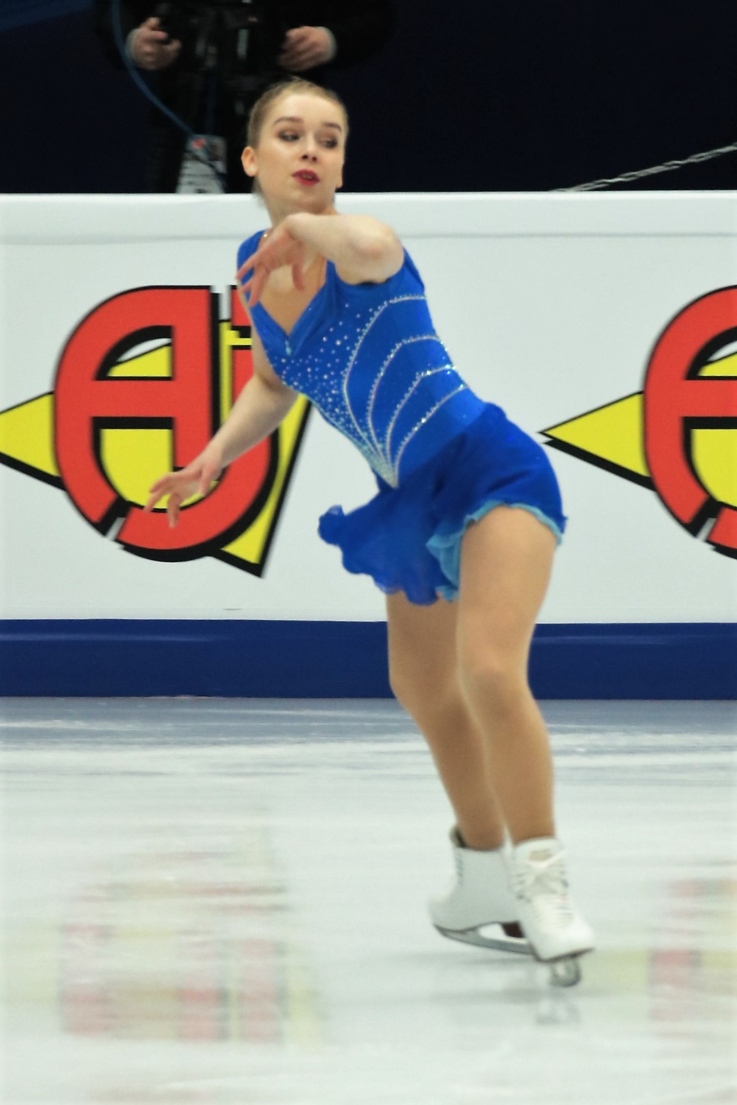 Вивека Линдфорс (Финляндия) на Чемпионате Европы по фигурному катанию 2018.